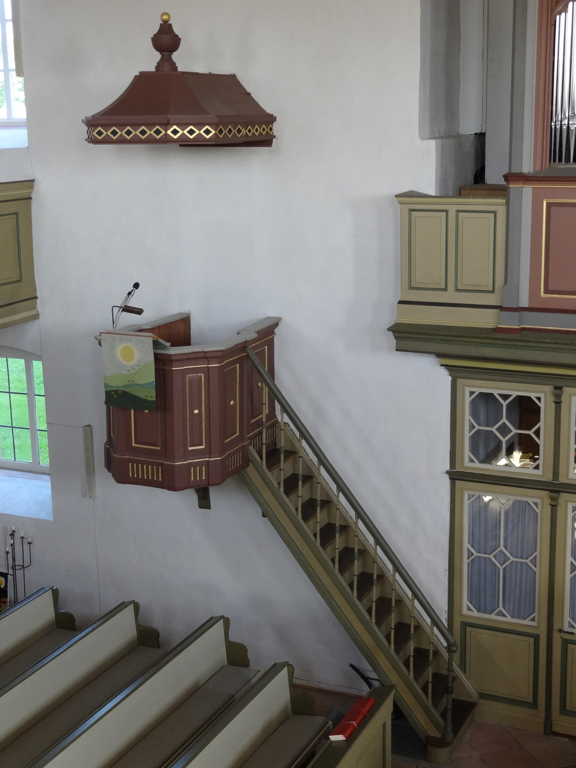 Evangelische Kirche Bellersheim